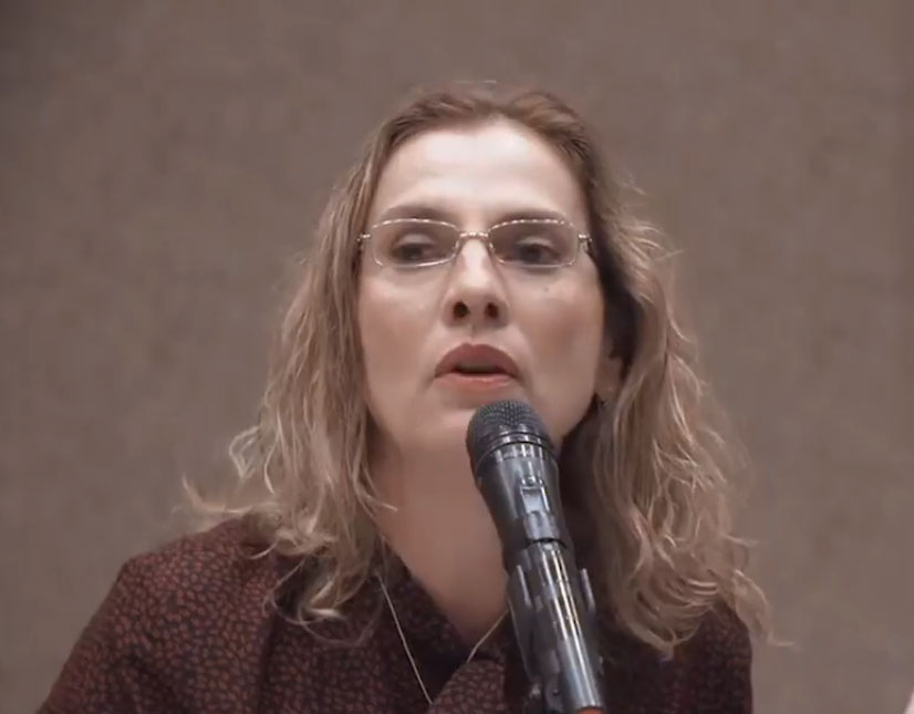 Beatriz Gutierrez esposa de Andres Manuel Lopez Obrador